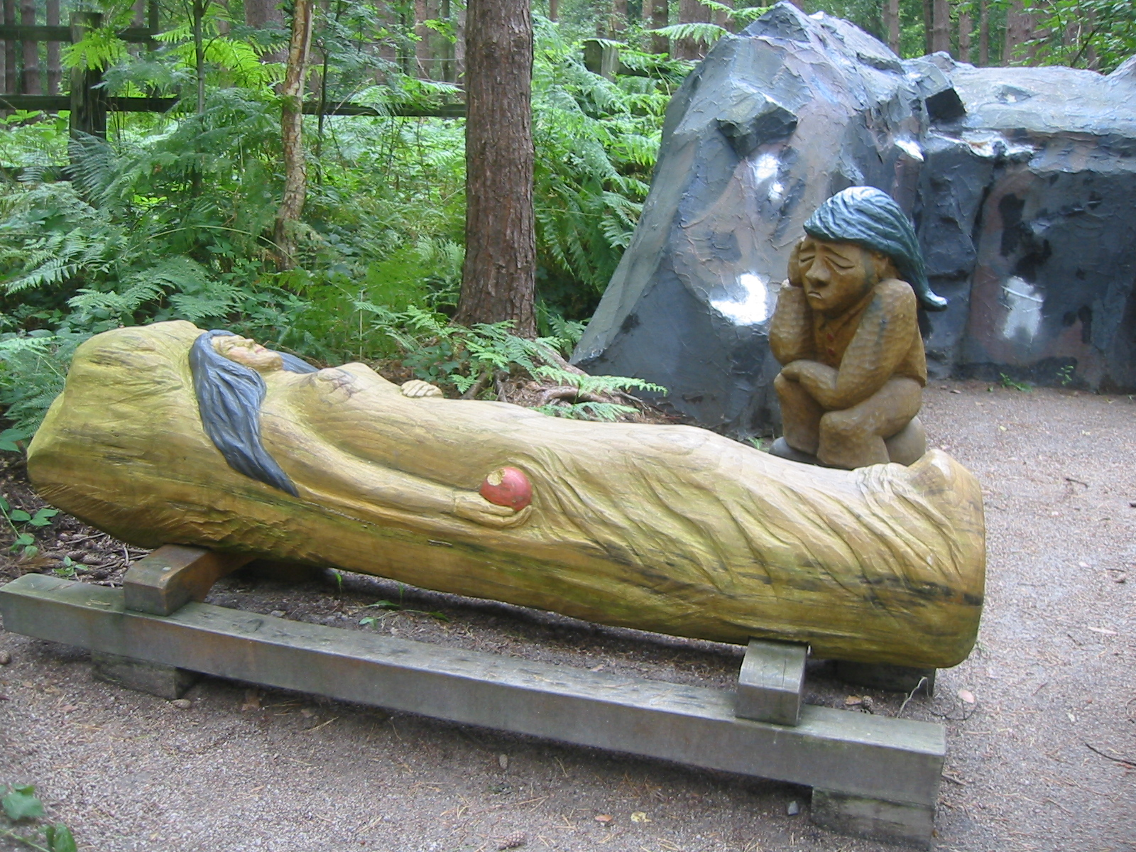 Märchenwald mit einer Szene aus "Schneewittchen" im Forst- und Köhlerhof, ein technisches Denkmal in Rostock-Wiethagen